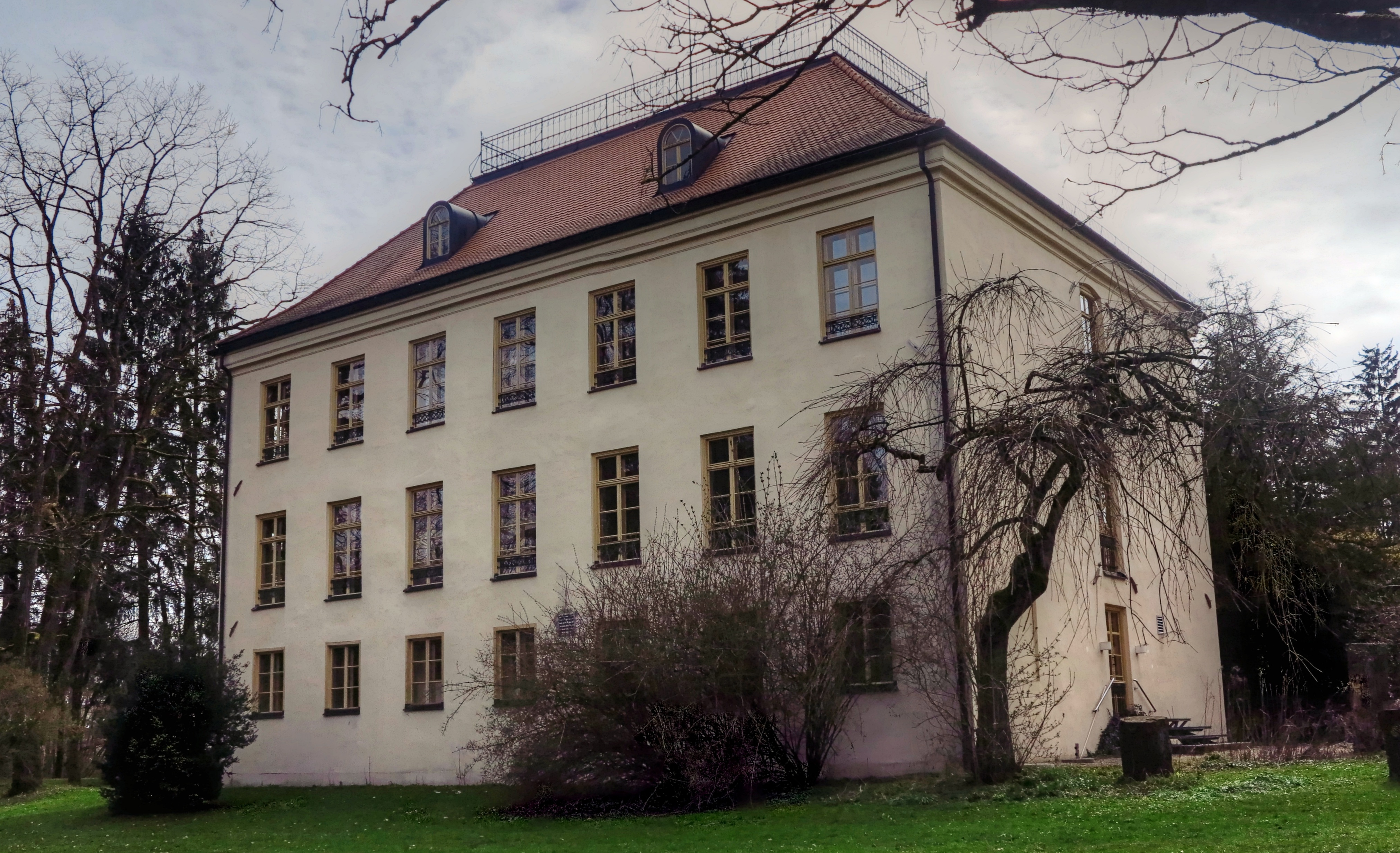 Deutschland, Bayern, Bezirk Oberbayern, Landkreis Starnberg, Gauting, Am Schloßpark, Gartenseite von Schloss Fußberg, HDR-Aufnahme